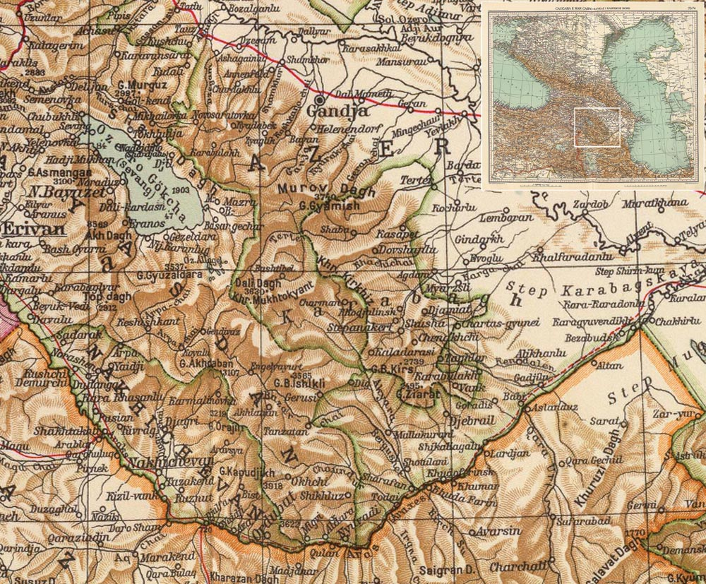 Armeniens och Karabachs gränser ur en kartbok från 1929. Noterna avsaknaden av gräns mellan Turkiet och Nachijevan samt nutida gapet mellan Armenien och Karabach.